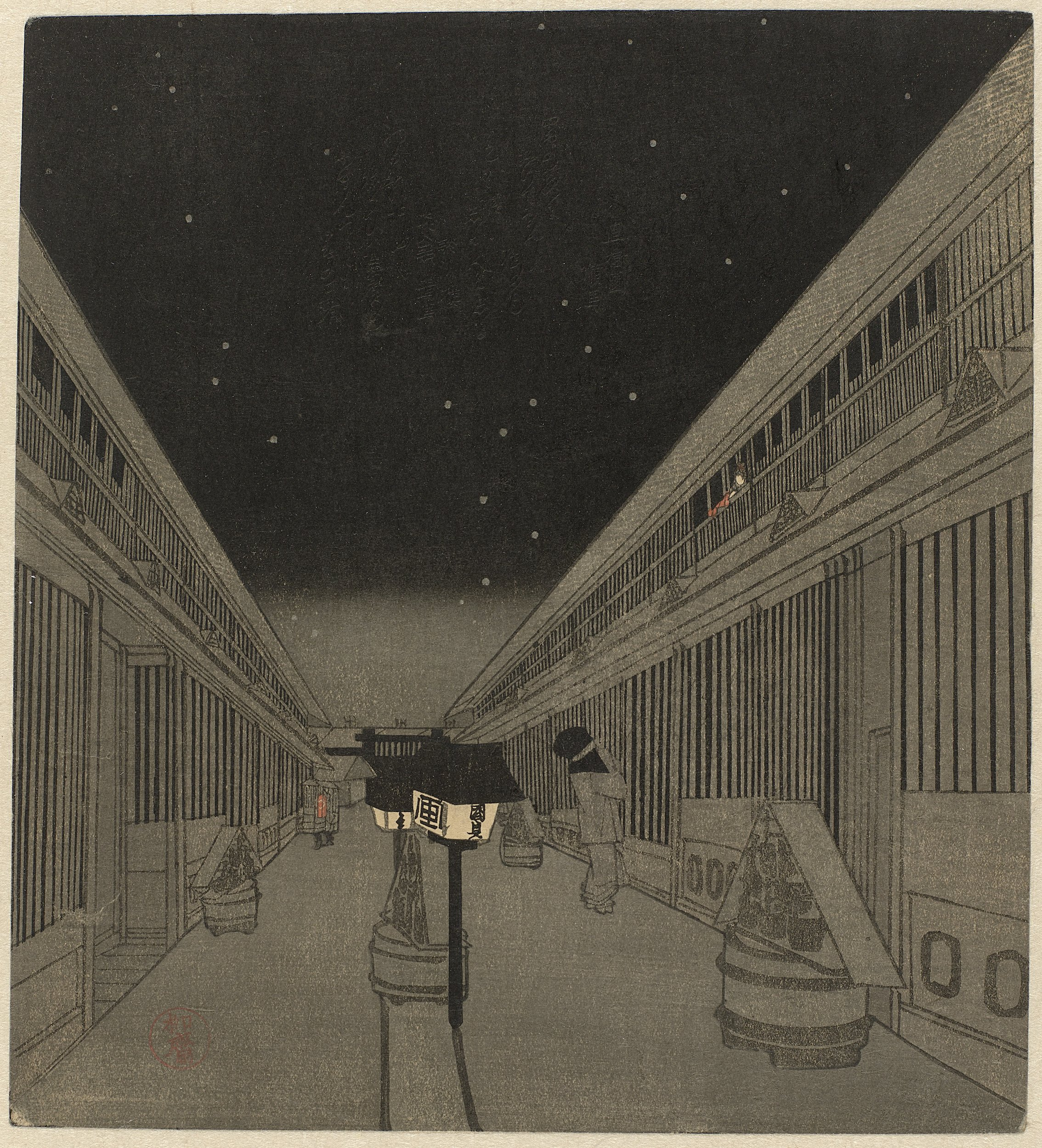 De hoofdstraat, Nakanocho van de rosse buurt Yoshiwara. Een man, met een doek om het hoofd om onherkenbaar te blijven neemt afscheid van een courtisane die uit het raam kijkt. Met twee gedichten verborgen in de sterrenhemel. Label Line: Kunisada (II) , Utagawa (1823 - 1880), ca. 1852 - 1864, kleurenhoutsnede; lijnblok in zwart met kleurblokken Collection: prenten; Japan (collectie)